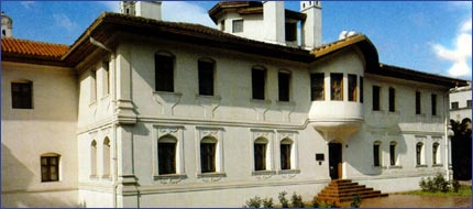 Countess Ljubica's Residence in Belgrade, Serbia/La Résidence de la princesse Ljubica à Belgrade, Serbie (caractéristique du style "balkanique")